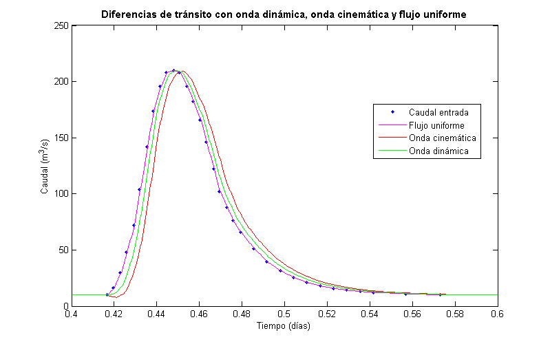 Comparación de los hidrogramas de salida utilizando los métodos de flujo uniforme, onda cinemática y onda dinámica en un canal rectangular con n de Manning de 0.030, longitud 1000m y pendiente 0.001